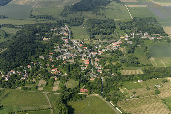 Monoszló, a község magasból fényképezve